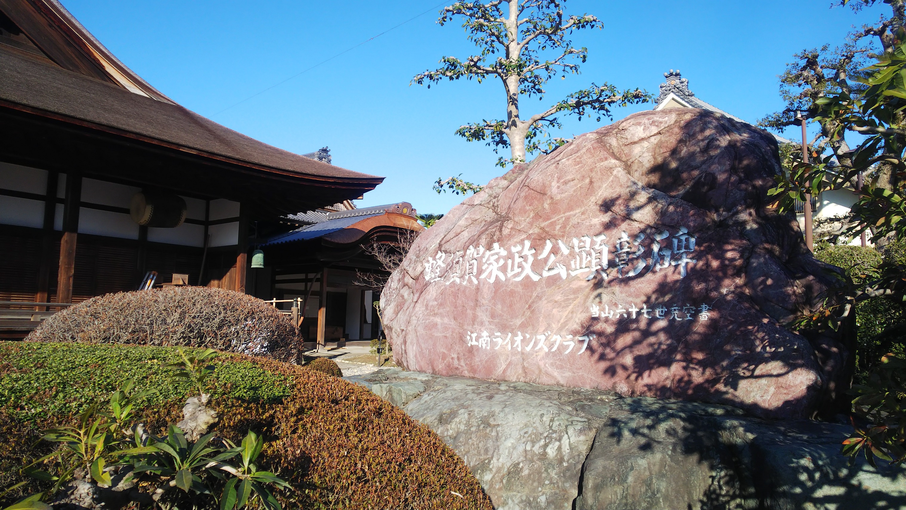 境内の蜂須賀家政顕彰の碑